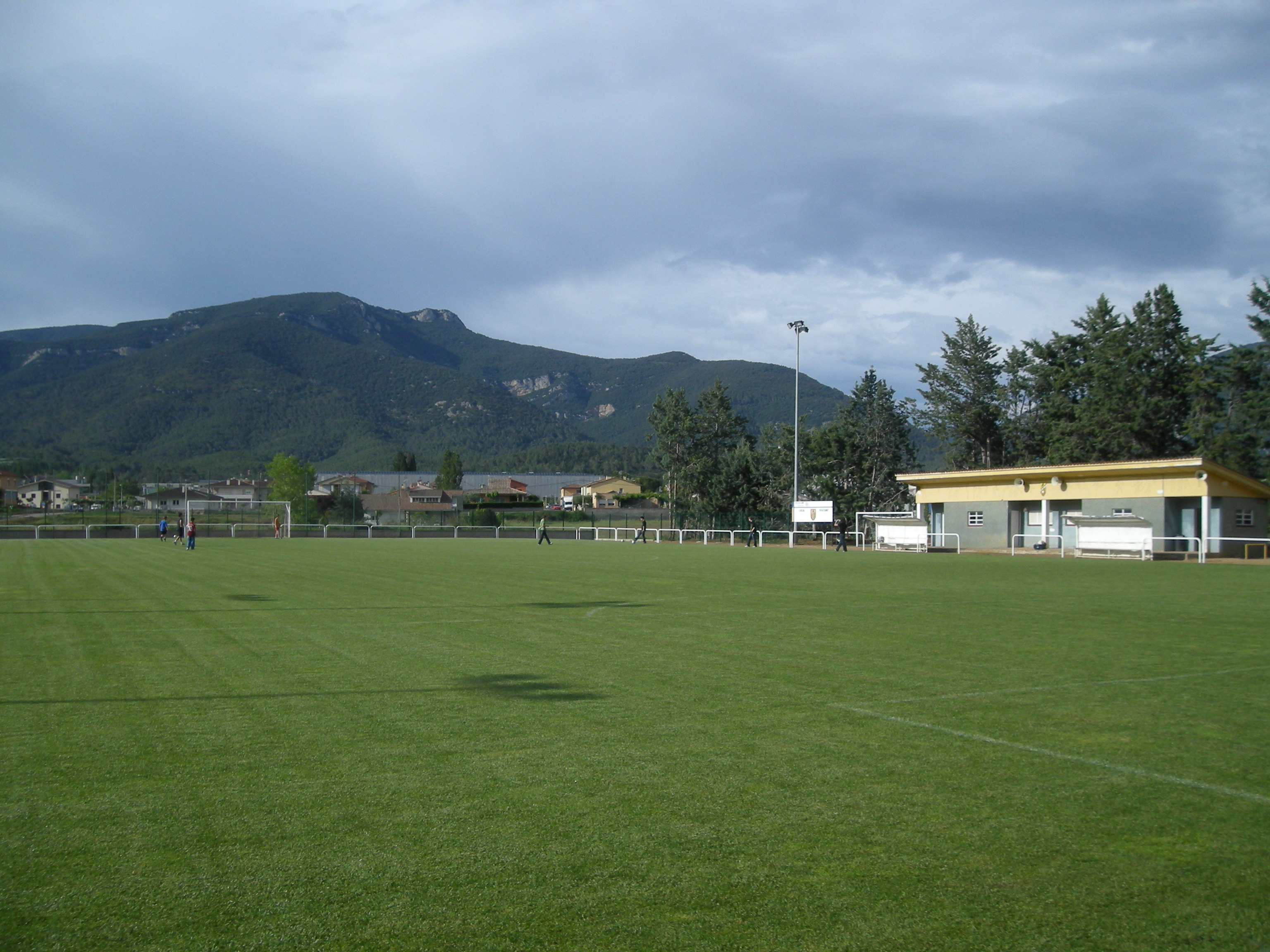 Camp municipal d'esports de Tortellà